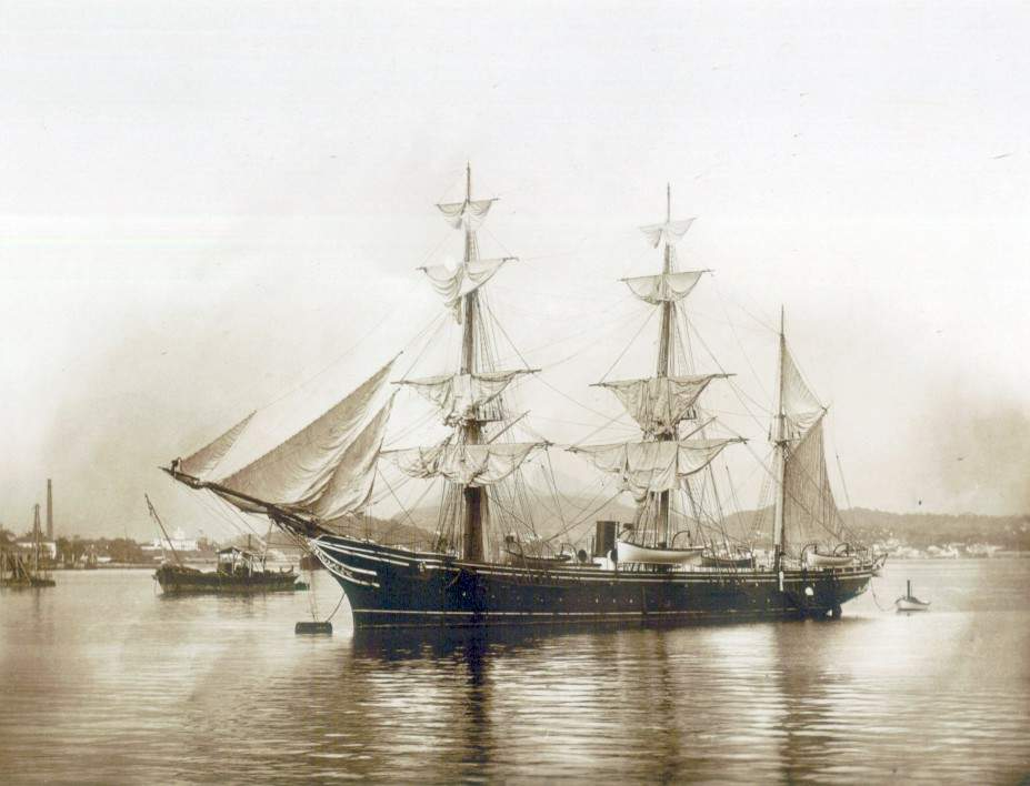 Cruzador Imperial Marinheiro fundeado na Baia de Guanabara - Marinha do Brasil- Naval ship of Brazil.